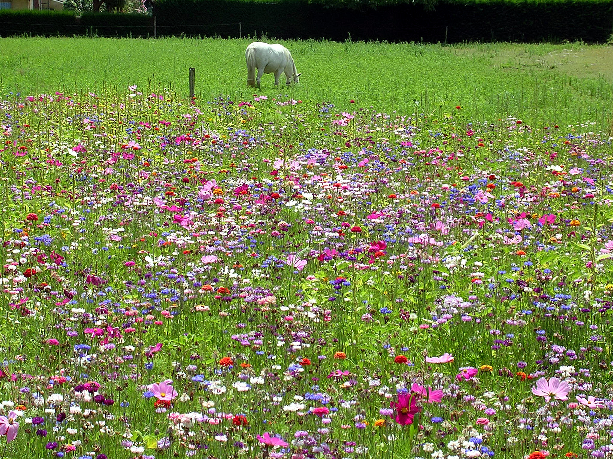 Jachère fleurie à l'initiative des chasseurs, agriculteurs et Conseil Général des Landes.